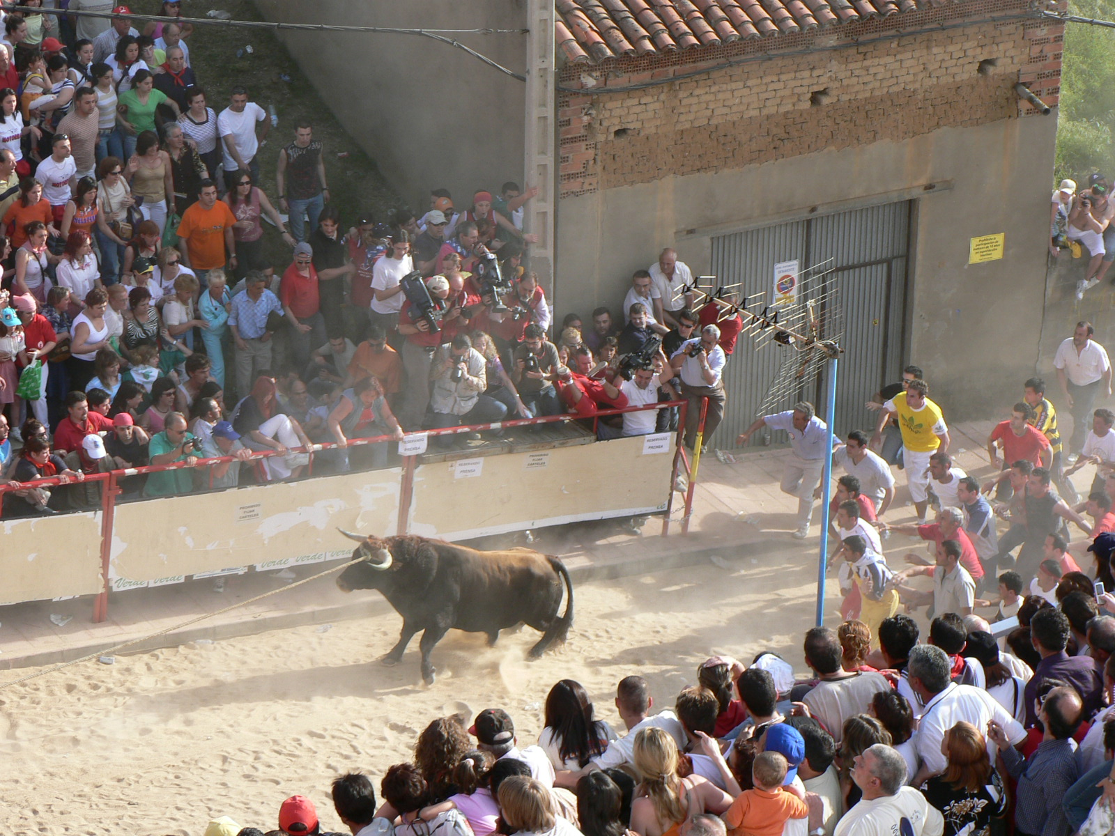 Fotografía del toro enmaromado. Fiesta popular de Benavente (Zamora) --Achica 02:06 2 jun, 2005 (CEST) Simple y llanamente hecha con mi cámara.